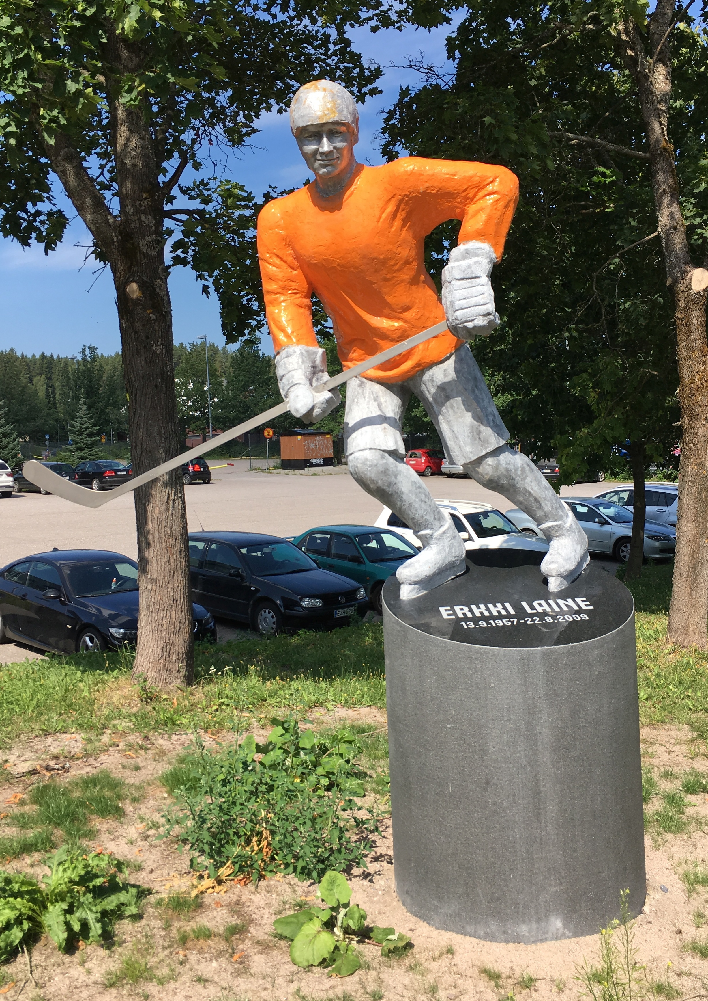 Erkki Laine Statue